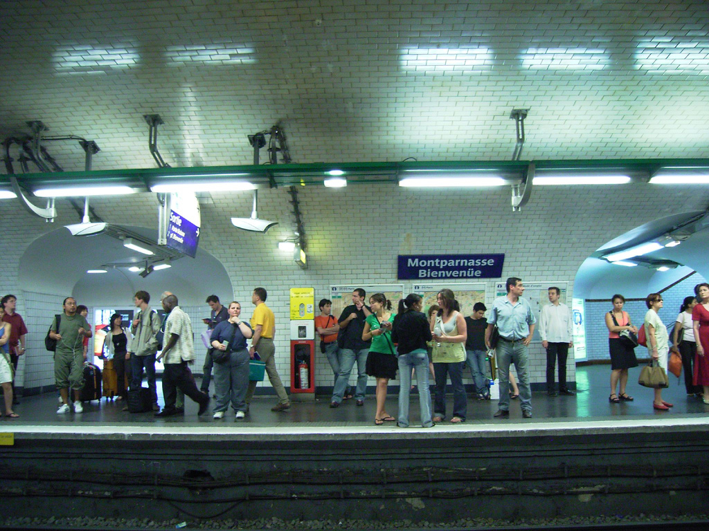 Metro de Paris station Montparnasse Bienvenue Ligne 12